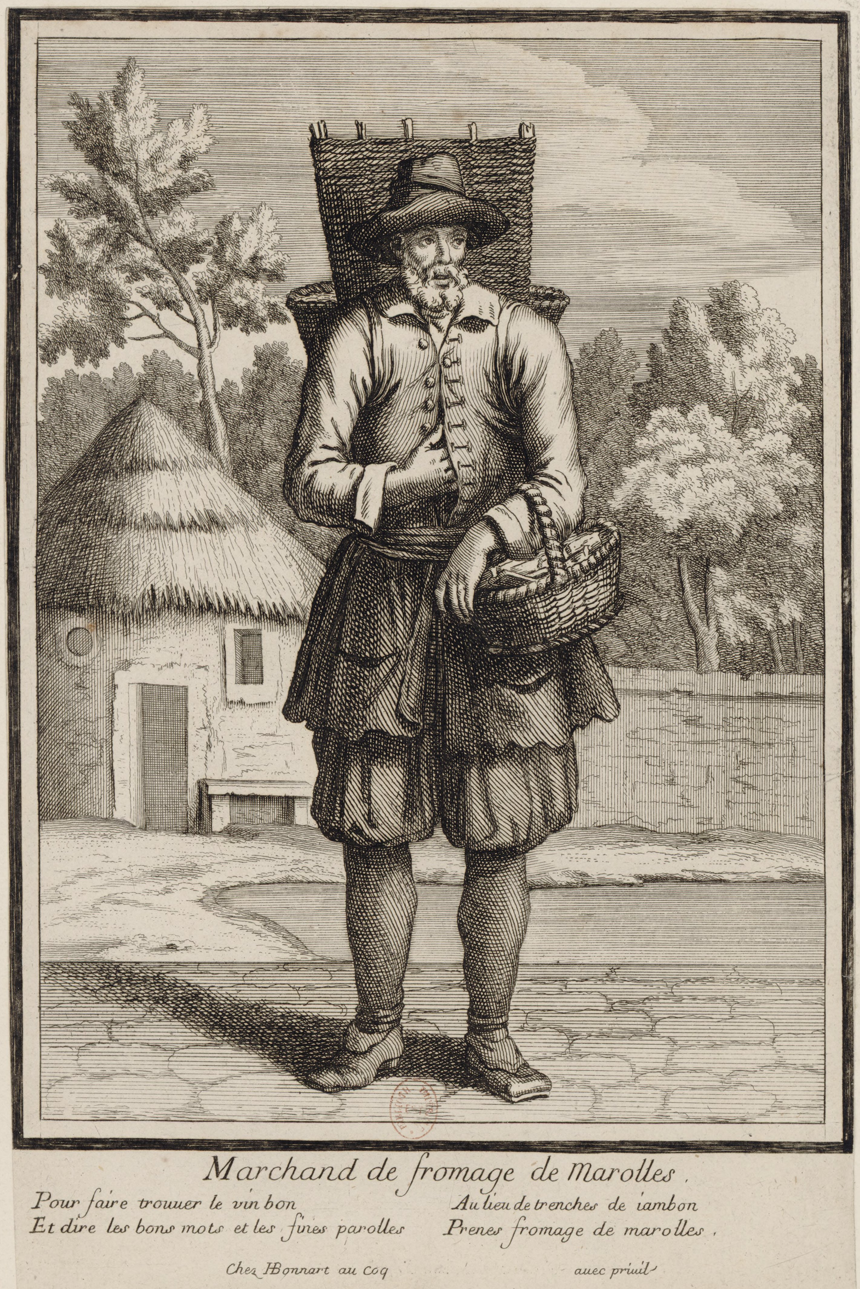 Estampe représentant un marchand de fromage de Marolles au XVIIe siècle